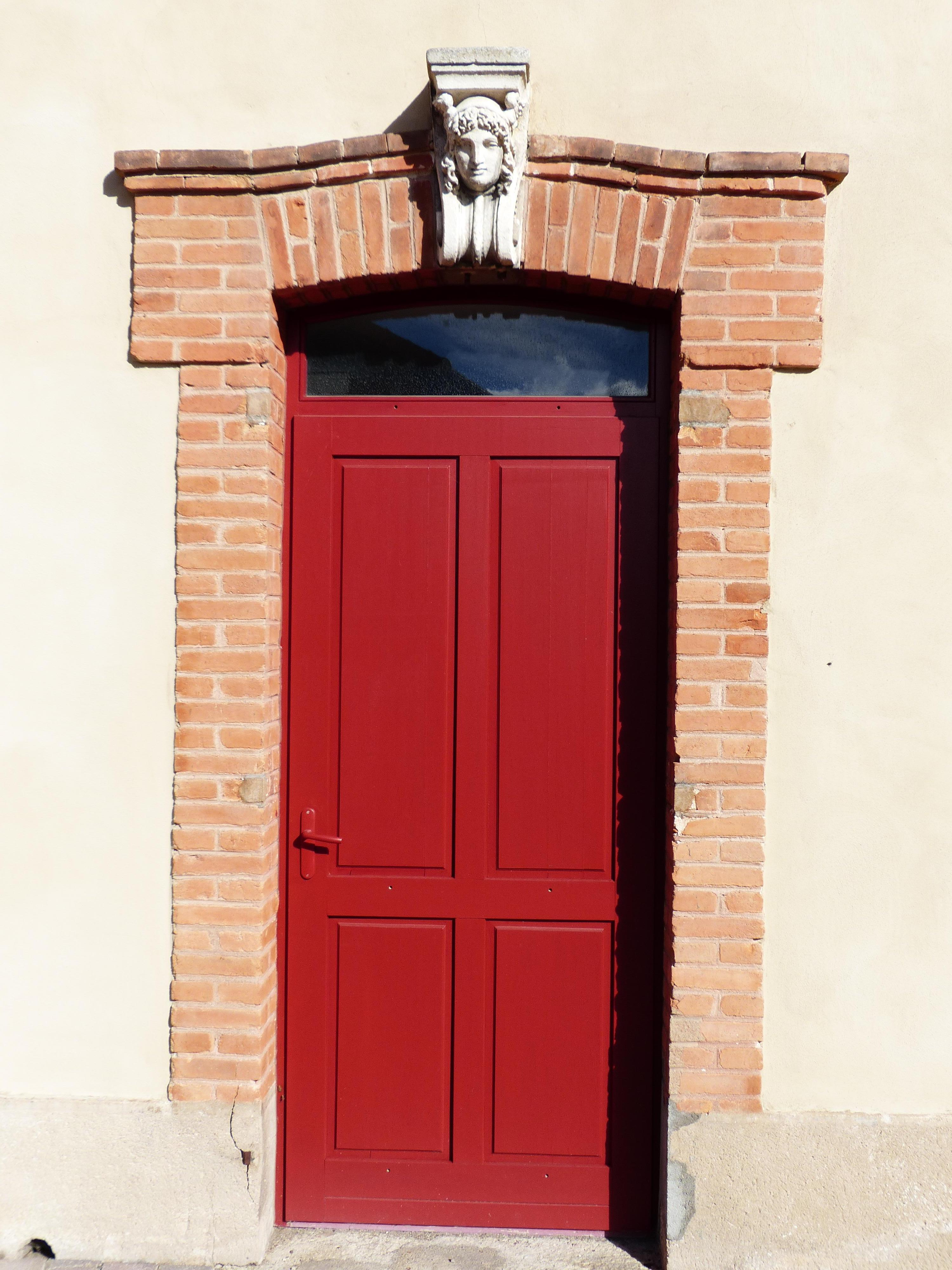 Lezoux (Puy-de-Dôme). Ancienne usine Bompard. Porte caractéristique de l'ancienne architecture : entourage des ouvertures en briques, avec parfois des sculptures en pierre.